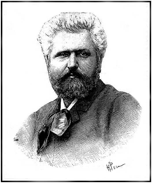 portrait de Stephen Sauvestre